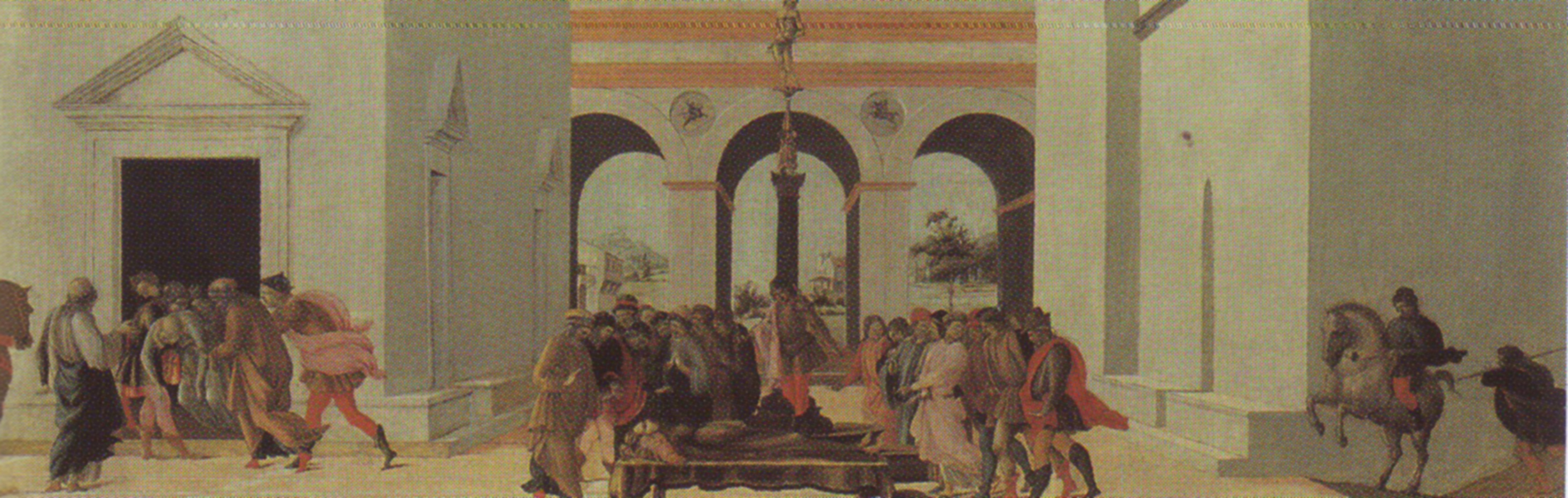 Filippino, morte di lucrezia